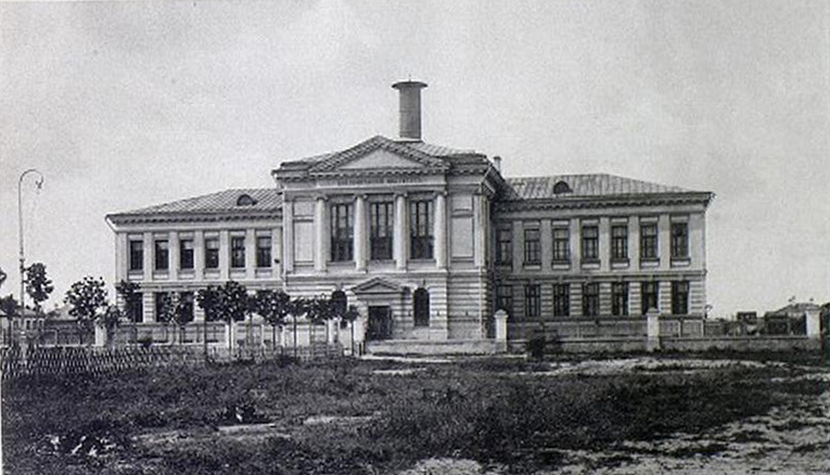 Институт патологической анатомии, судебной медицины, топографической анатомии и оперативной хирургии на Девичьем поле. Фото 1897 года.